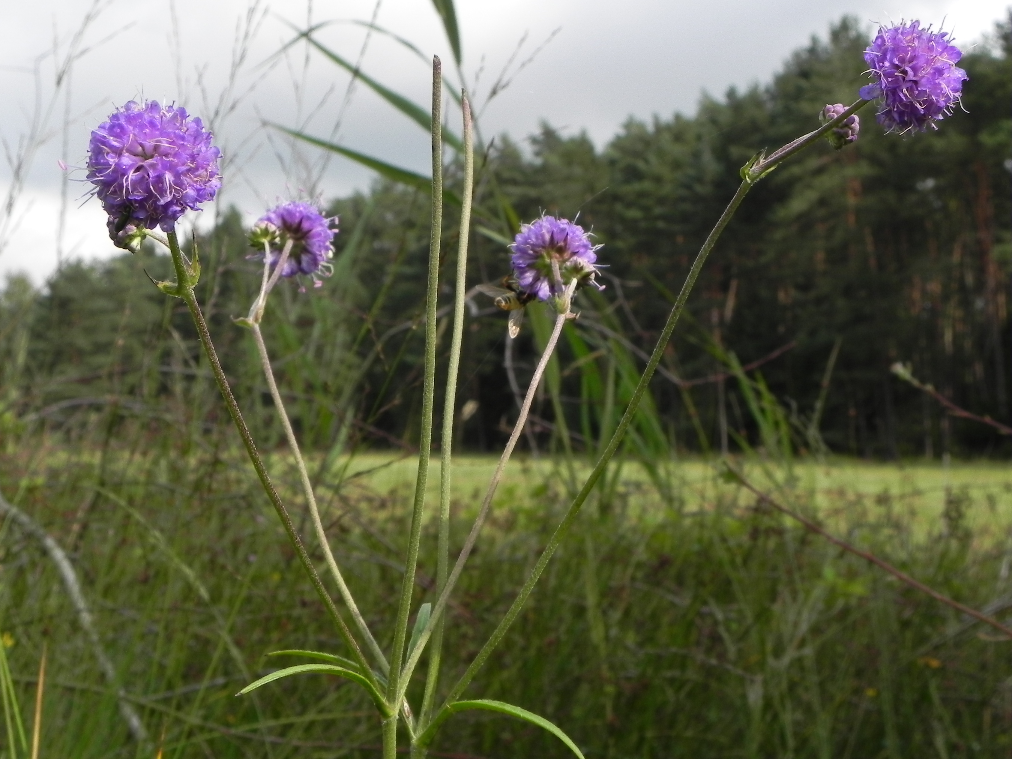 Teufelsabbiss (Succisa pratensis) Habitus, Südheide (Germany)